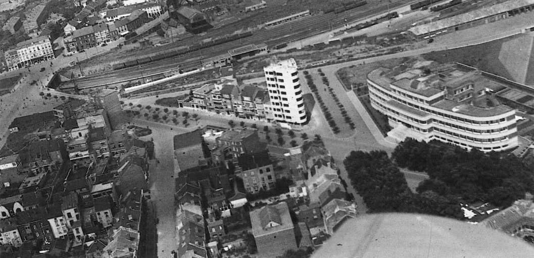 Charleroi (Belgique) - Porte de Waterloo, boulevards Dewandre et Zoé Drion en 1939. Au centre, immeuble moderniste à appartements (en construction), à droite, la maternité reine Astrid, deux œuvres de l'architecte Marcel Leborgne. Photo provenant des archives de la ville de Charleroi, publiée dans le document pédagogique "Je découvre mon quartier et ma ville. Je découvre Charleroi. Atlas des quartiers", 2001, fiche 18.